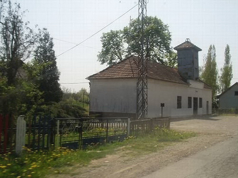 Brckovljani - House of Village